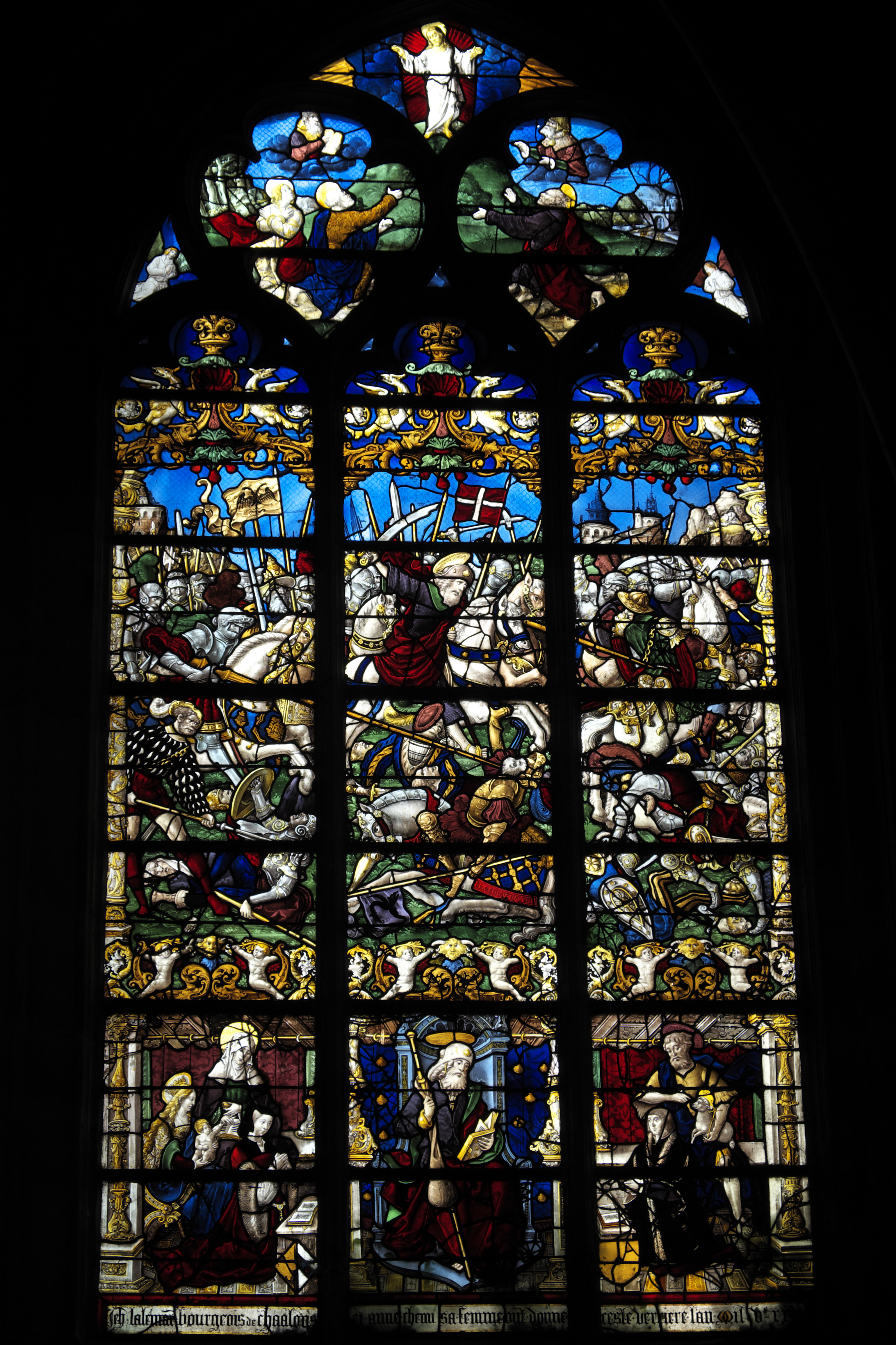 Bleiglasfenster (Baie 27) in der Stiftskirche Notre-Dame-en-Vaux in Châlons-en-Champagne im Département Marne (Champagne-Ardenne/Frankreich), um 1525; mit der Signatur des Renaissance-Glasmalers Mathieu Bléville; Darstellung: Schlacht von Clavijo; unten: Stifter (rechts und links), hl. Jakobus (Mitte)